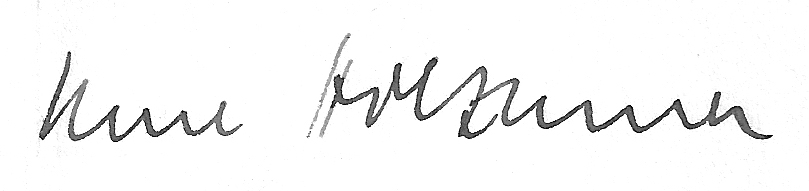 Karl Holzamer, Philosoph und Pädagoge. Signatur seines Briefes an mich vom 28.02.1958.